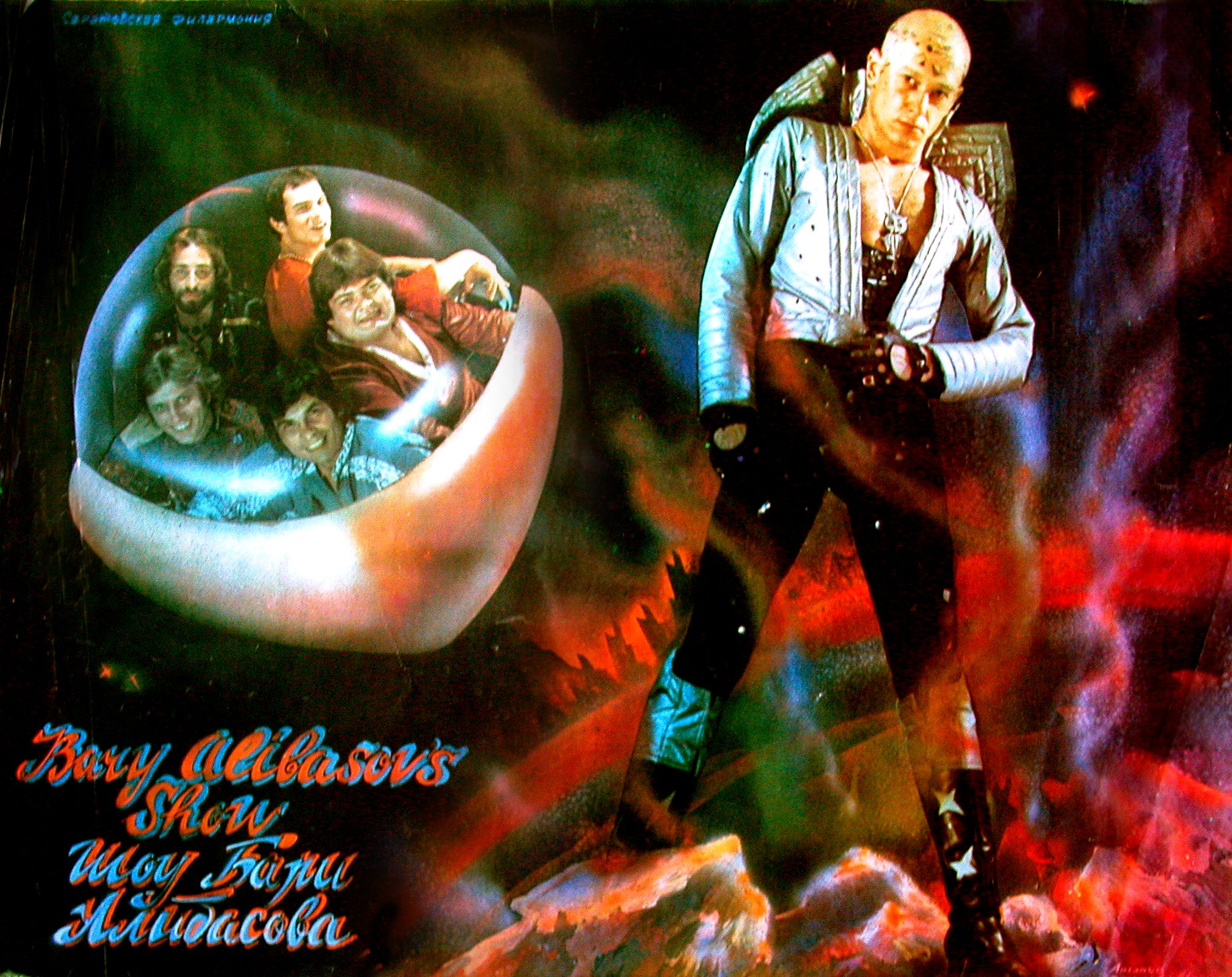 фотографии и афиши группы "Интеграл"